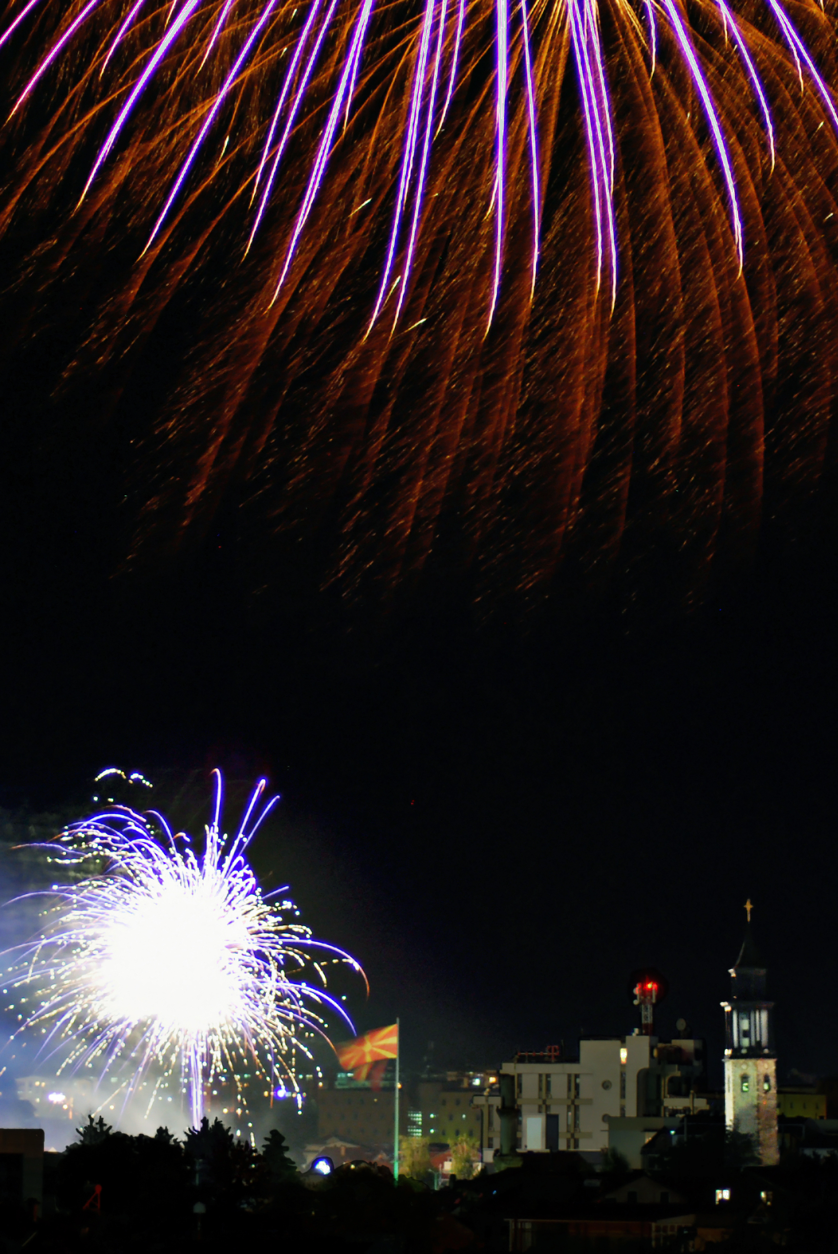 СаатКулата во Прилеп, фотографирана со огнометот на 11 - Октомври.